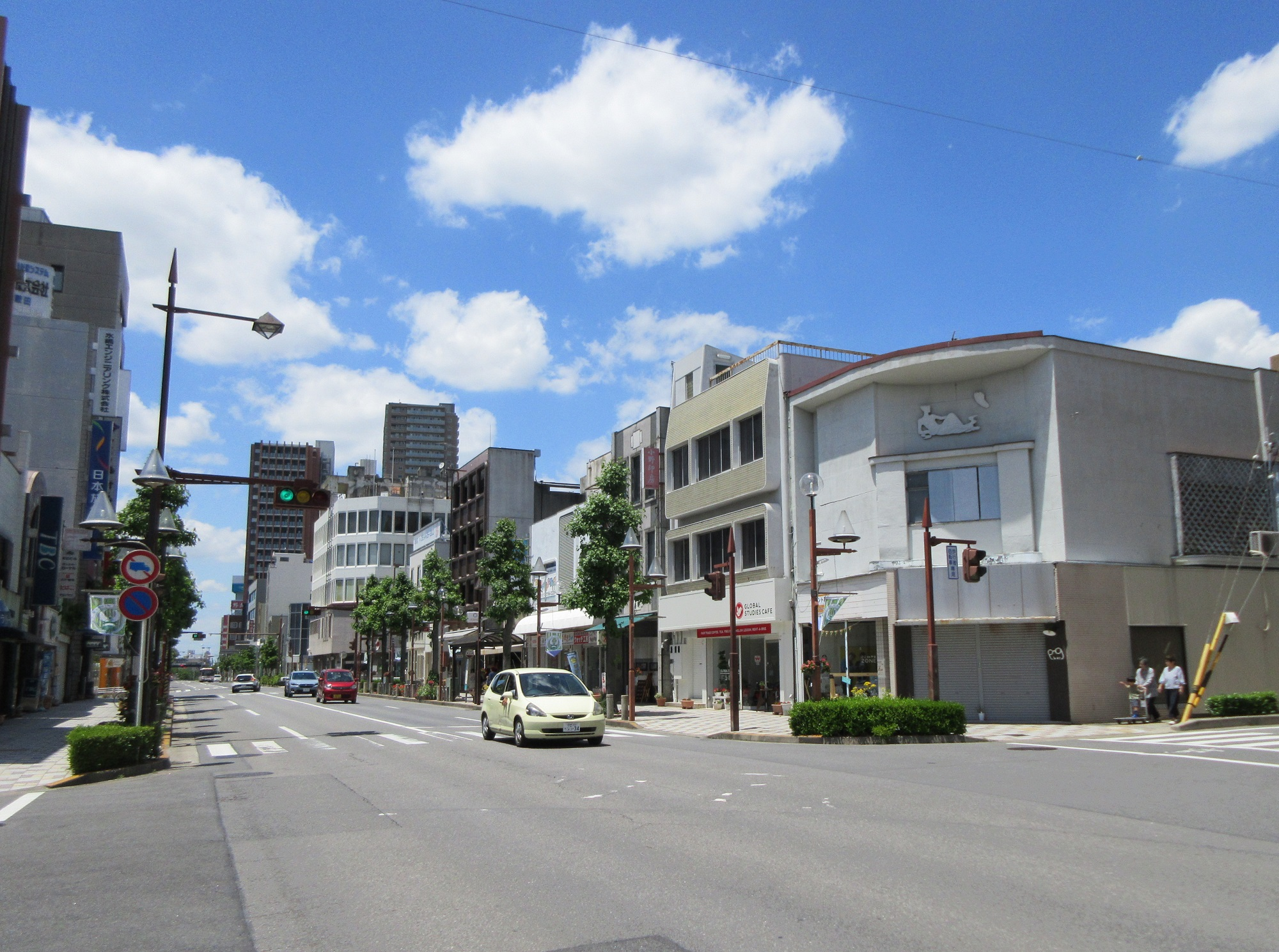 岡崎市康生通東